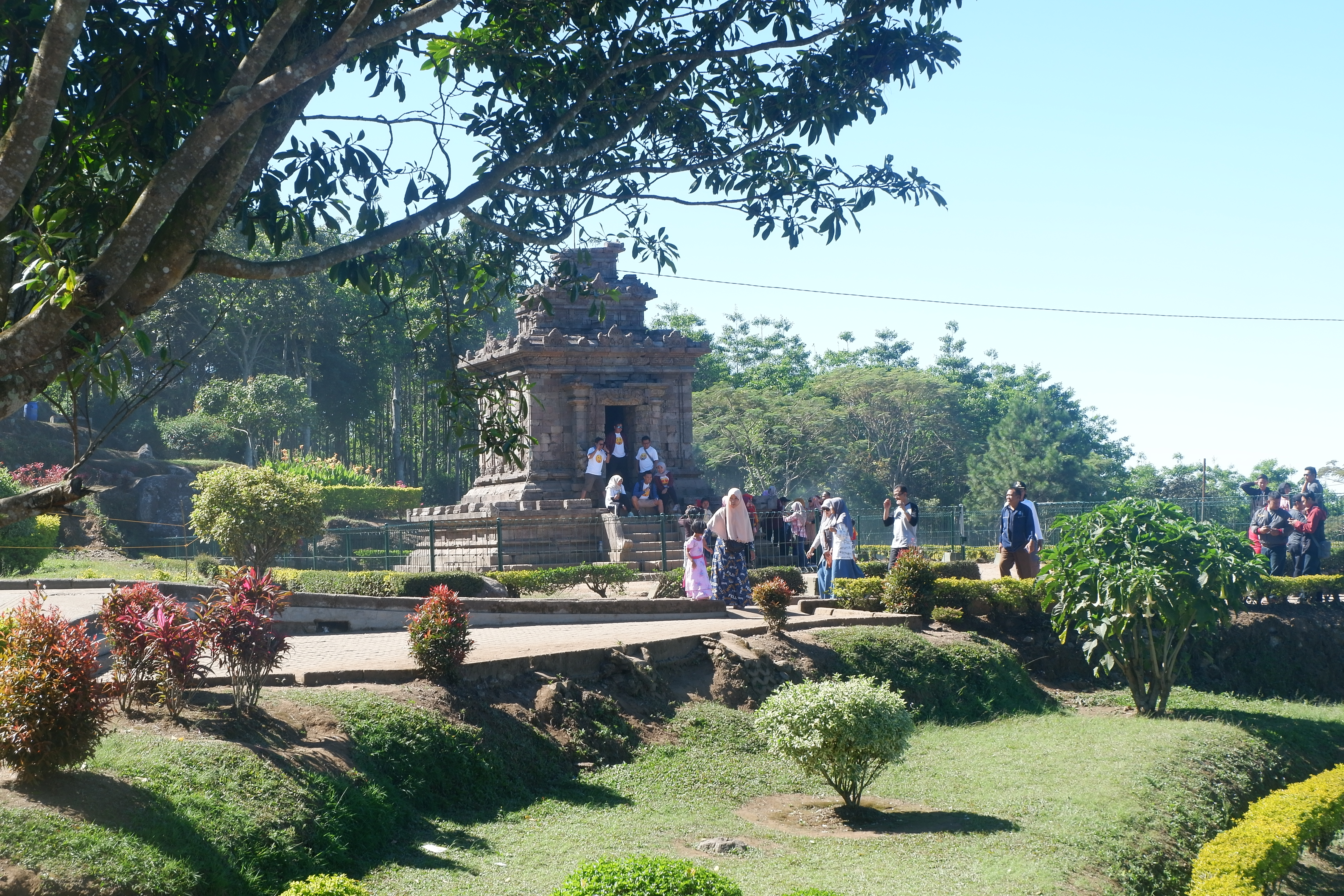 Candi Gedongsongo berada di Kabupaten Semarang, Jawa Tengah